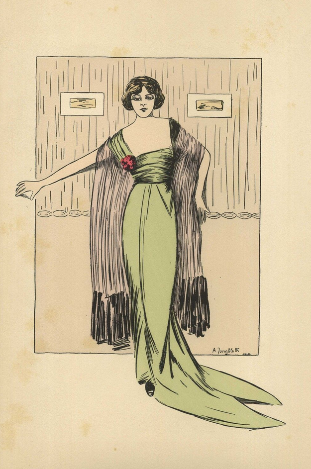 Photoprint after Alfred Jungbluth, in Les Créateurs de la mode, printed in Paris by éditions Le Figaro.